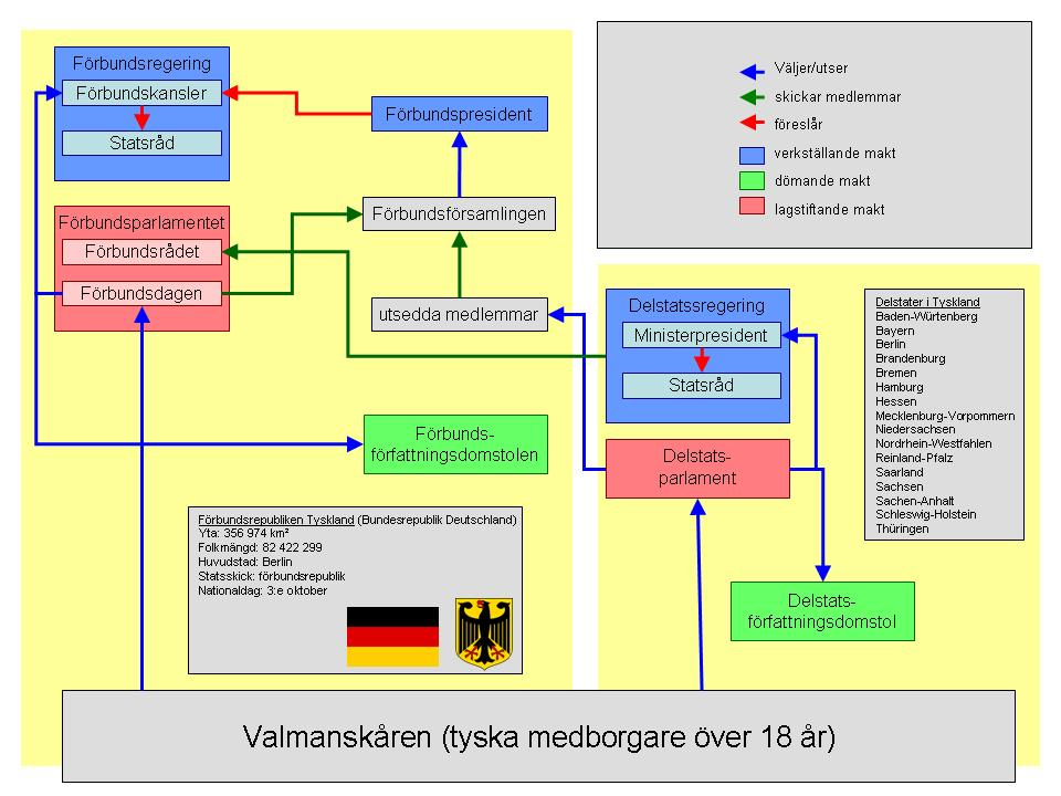 översikt tysk politik